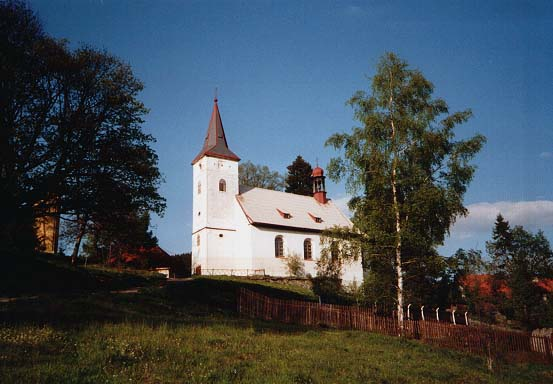 Kostel sv. Jana Nepomuckého v Nových Hamrech, okres Karlovy Vary